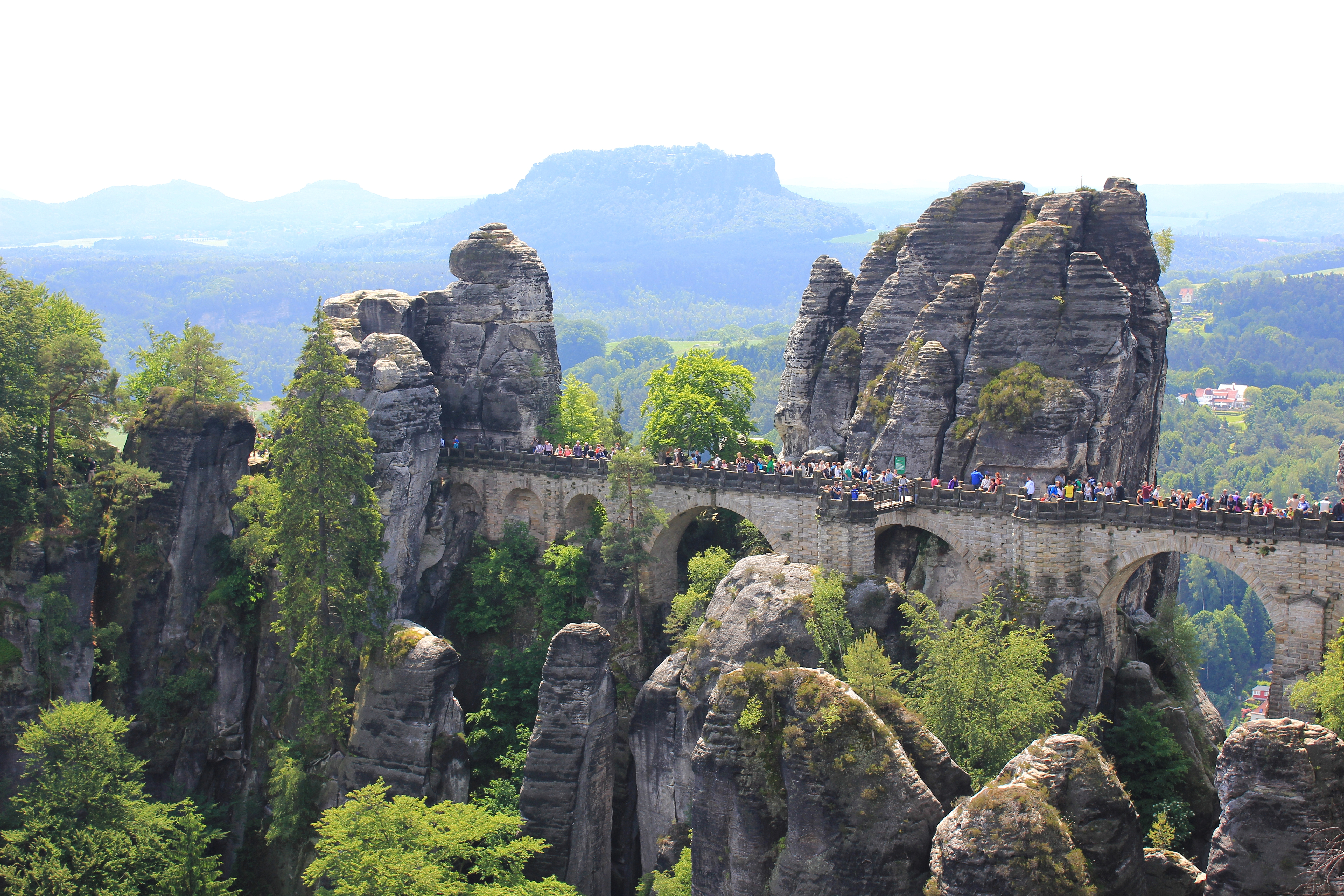 Sächsische Schweiz- Bastei Brücke..